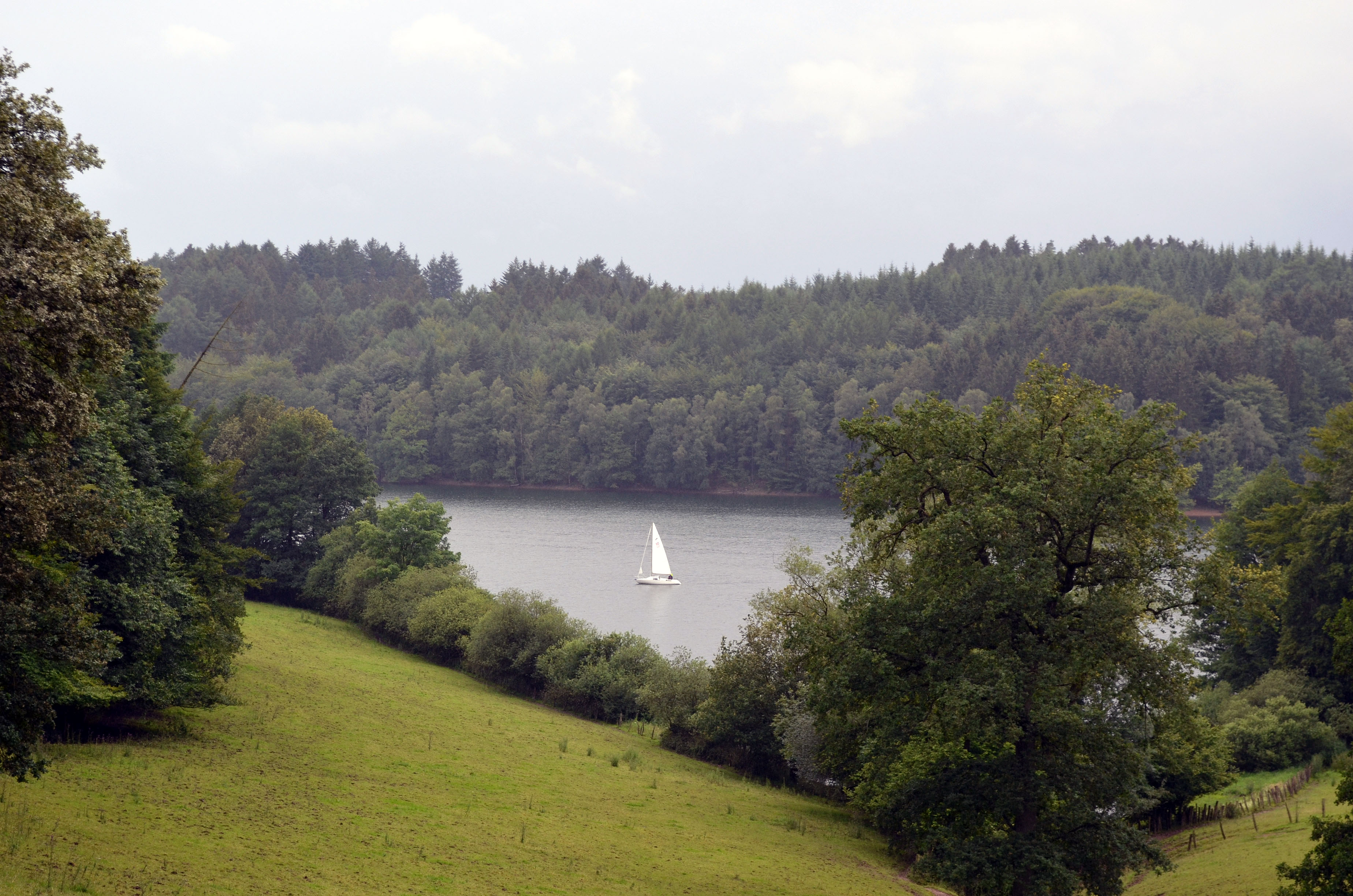 Wipperfürth, Großhöhfeld, Blick auf die Bevertalsperre 4